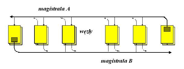 dqdb